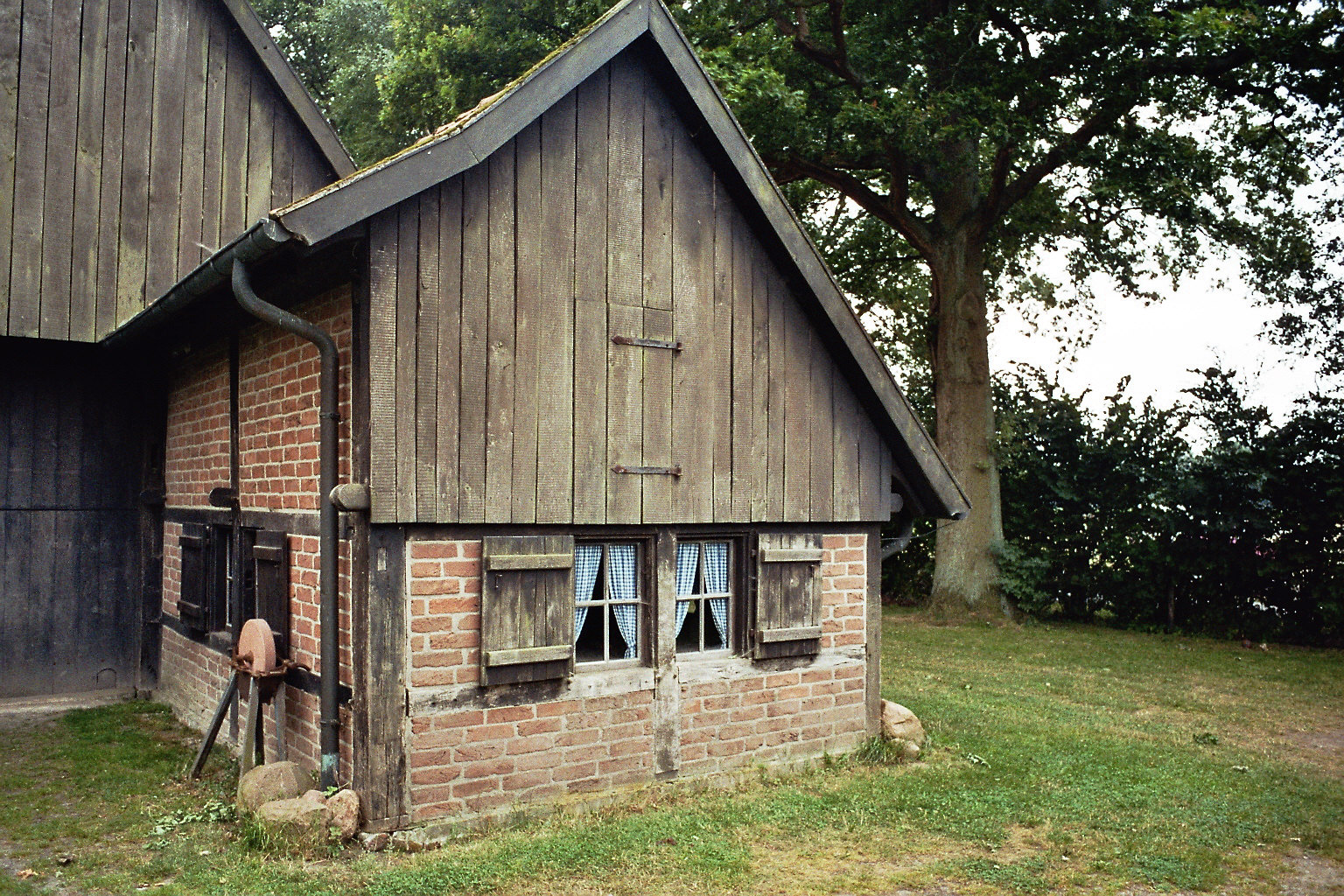 House of Anna Katharina Emmerick (1774–1824) in Coesfeld-Flamschen, Nordrhein-Westfalen, Germany